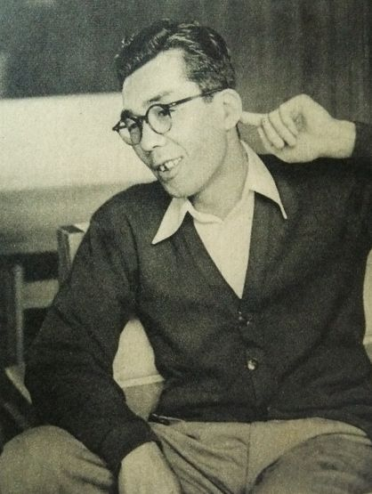 国枝利通